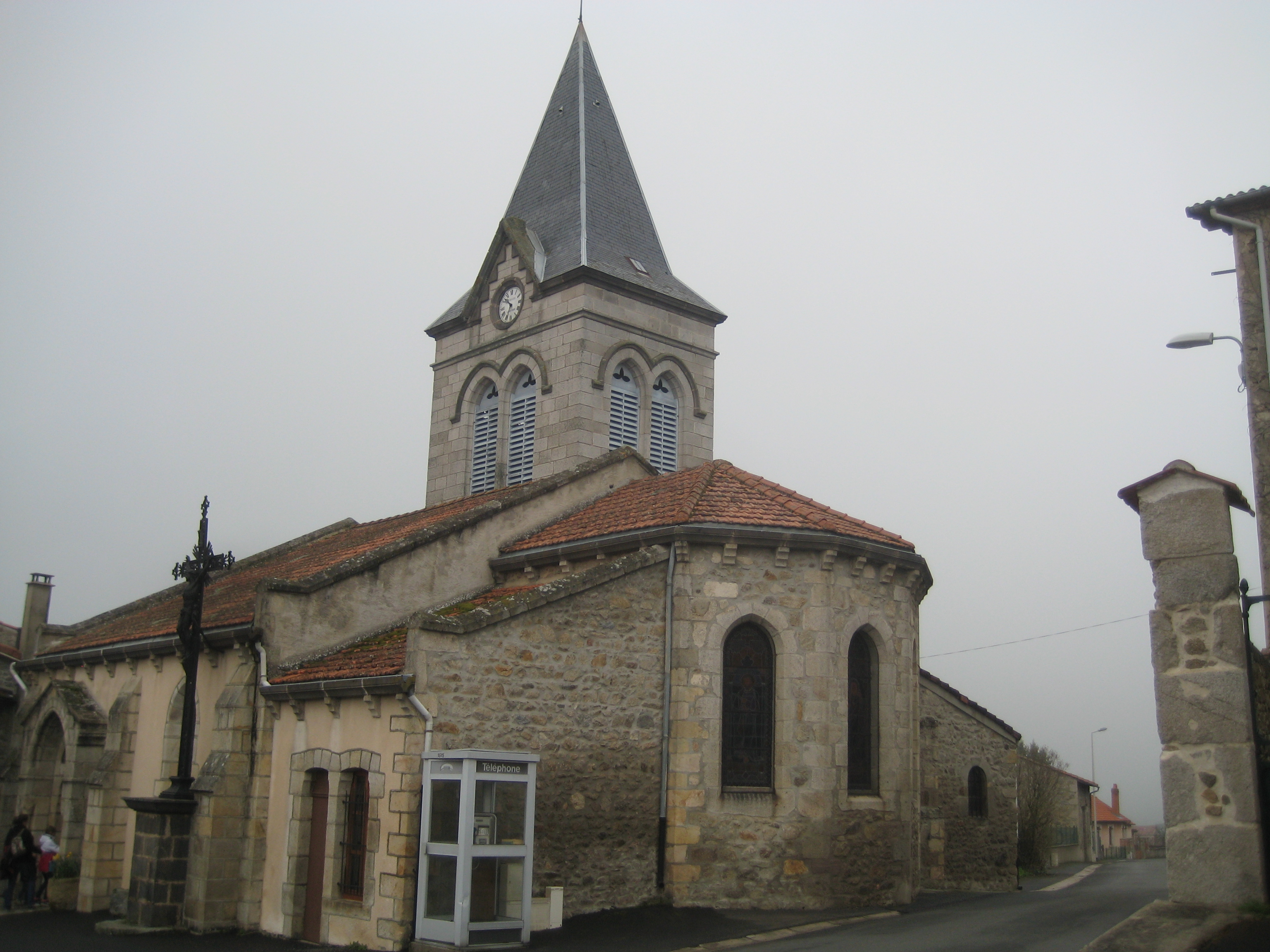 église Saint-Barthélémy de Champagnat-le-Jeune